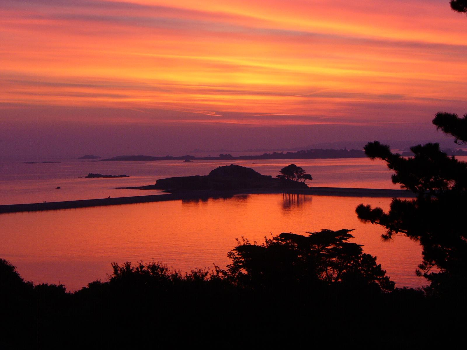 Coucher de soleil sur Sainte-Anne à Saint-Pol de Léon.